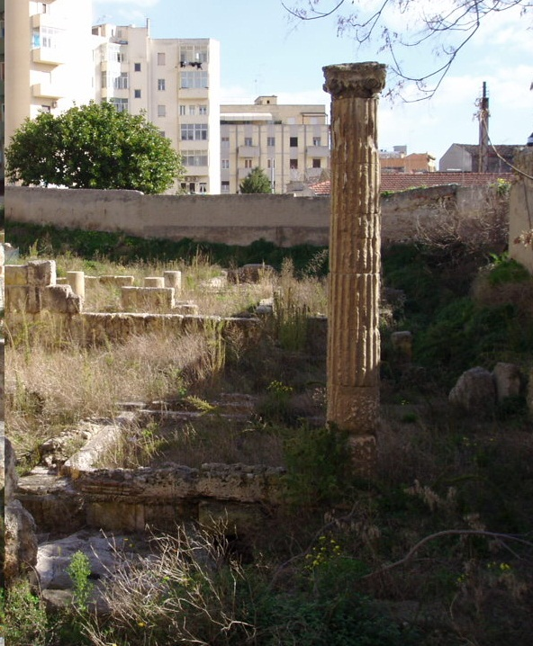 Villa di Tigellio nell'antica Caralis o Carales (odierna Cagliari)